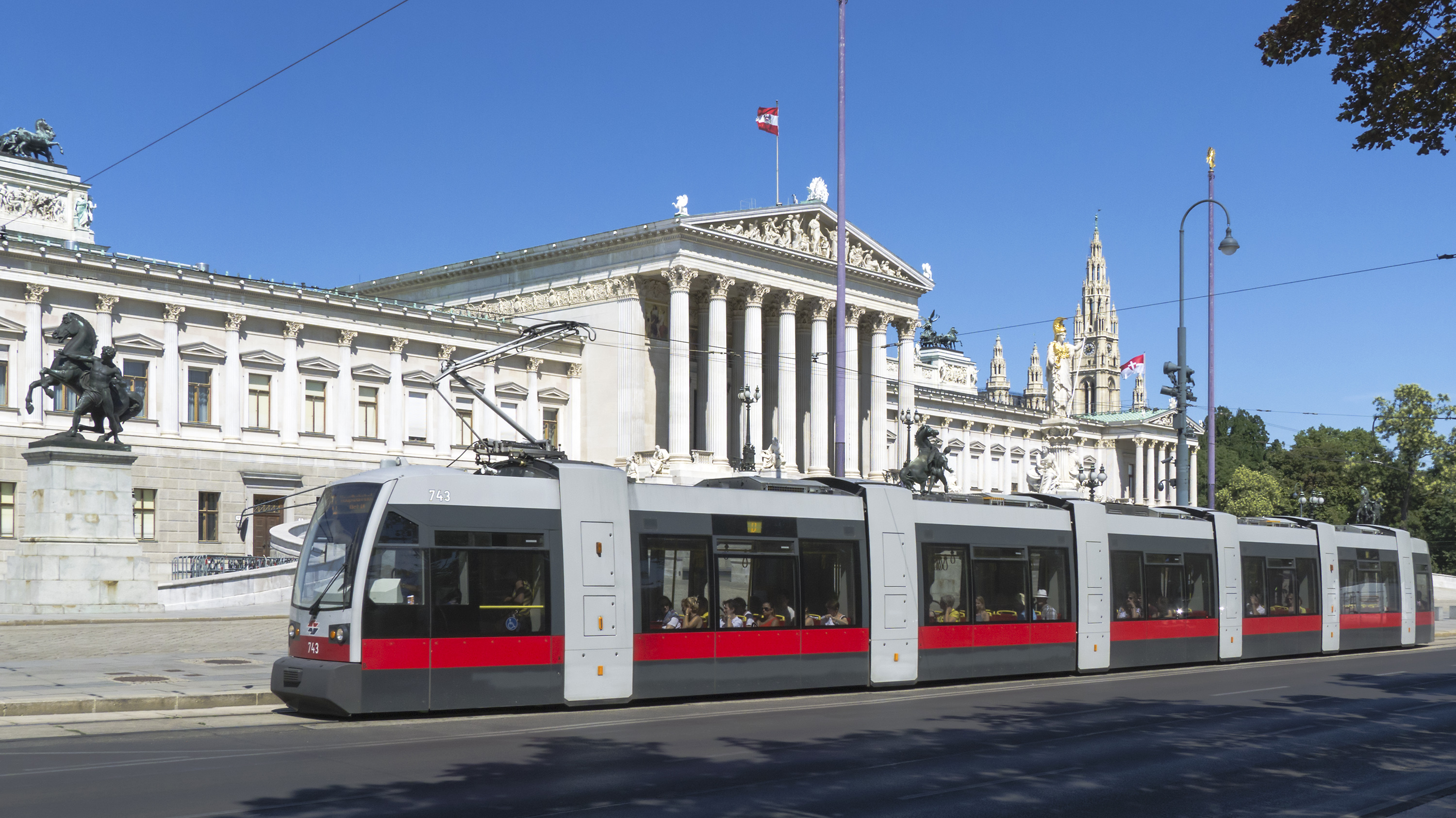 Straßenbahn (ULF Nr. 743) auf der Linie D vor dem Wiener Parlament